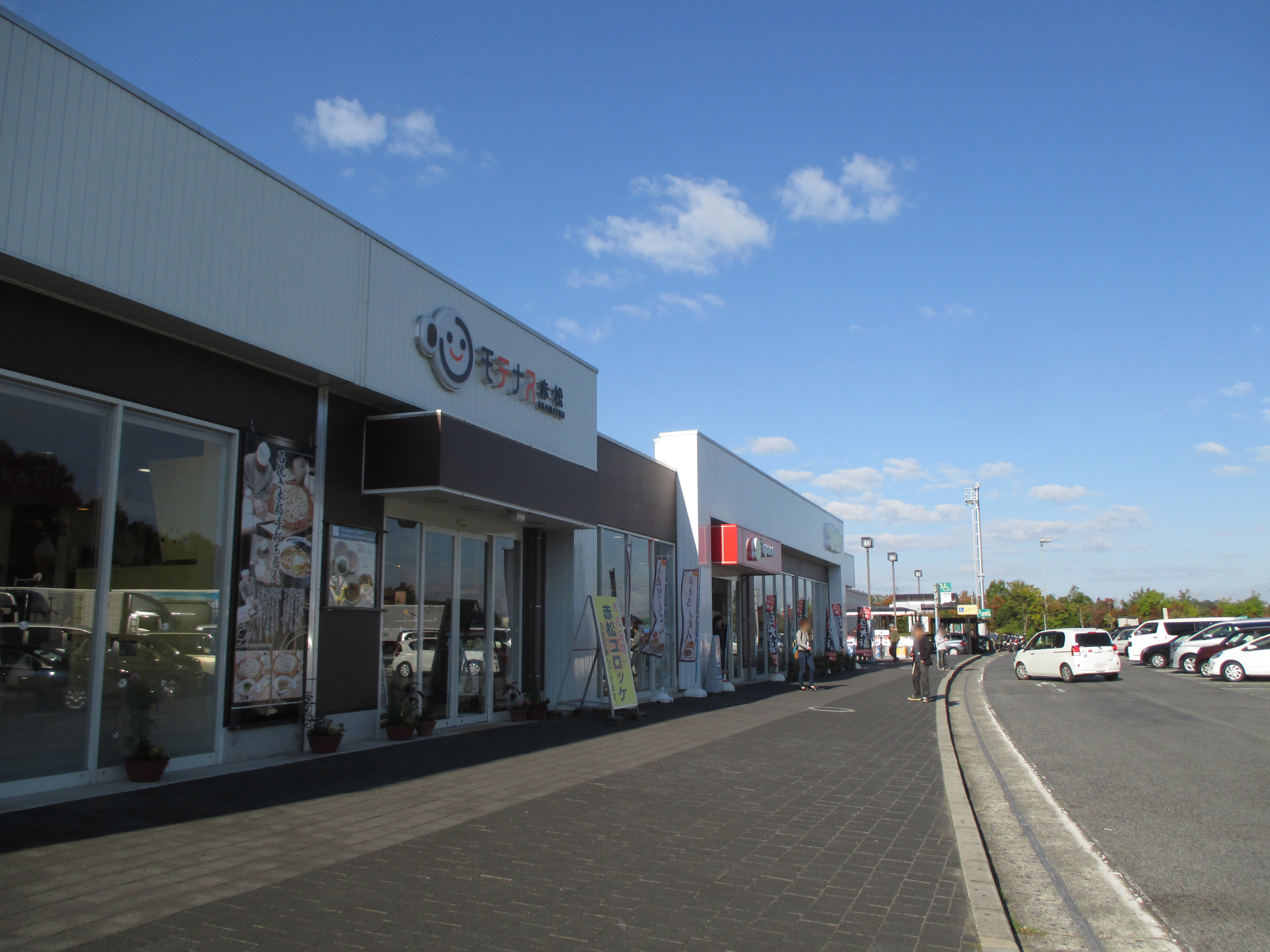 赤松パーキングエリア Akamatsu PA